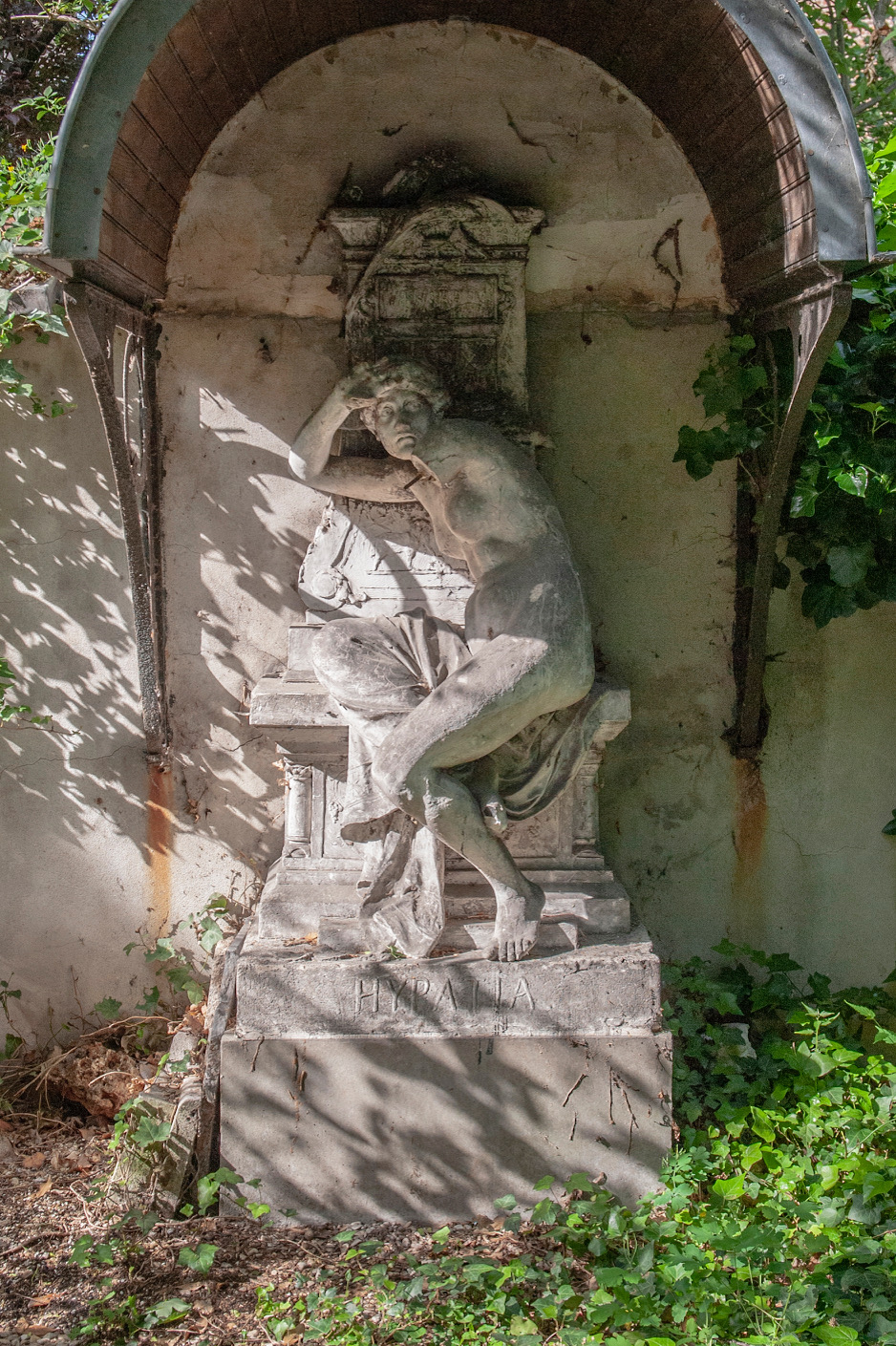 Statue réalisée par Emile Picault in situ dans l'allée d'artistes La Tombe-Issoire